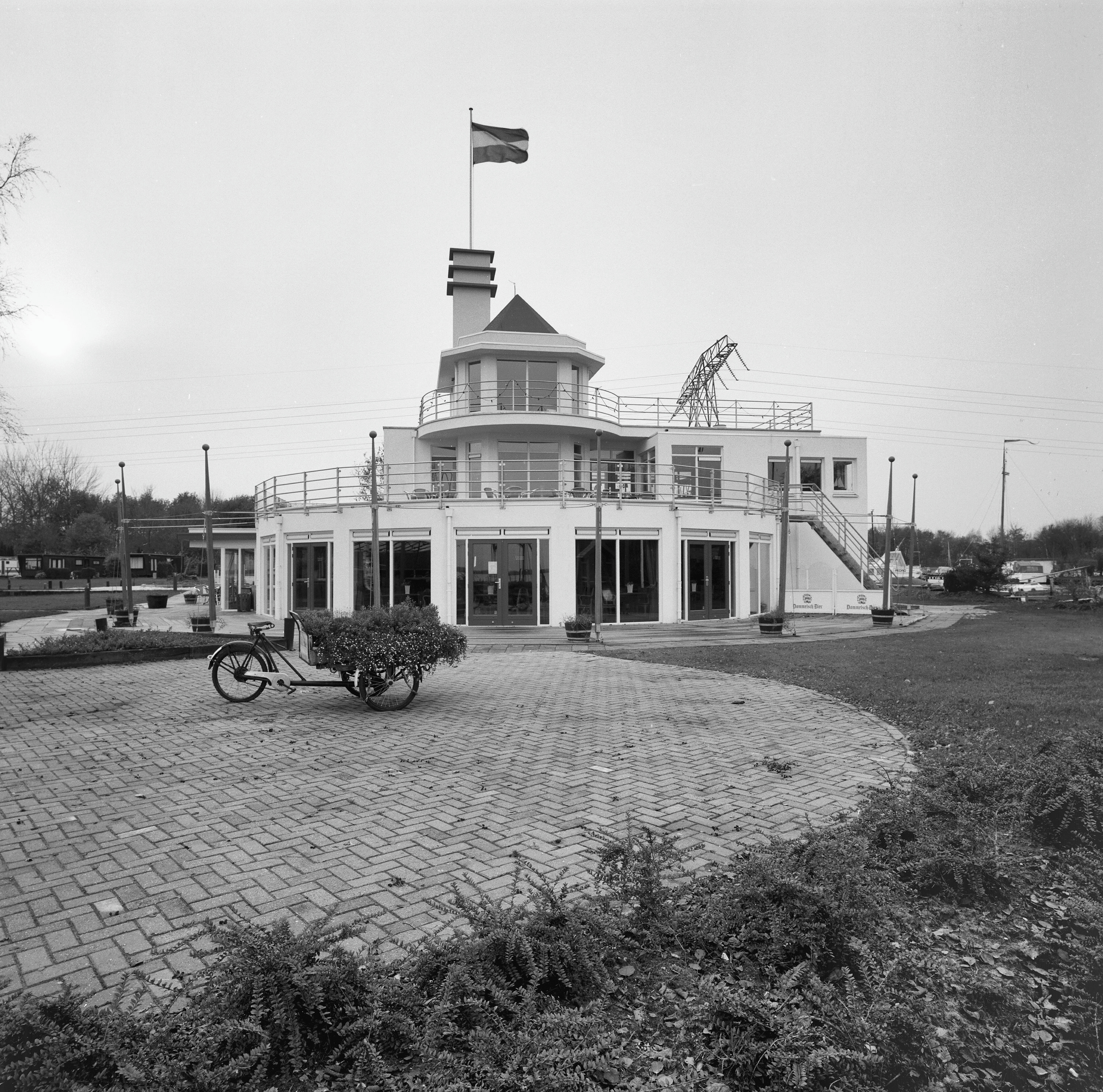 Paviljoen De Bloemert: Exterieur overzicht voorzijde (opmerking: Monumenten In Nederland Drenthe, Bladzijde 151)